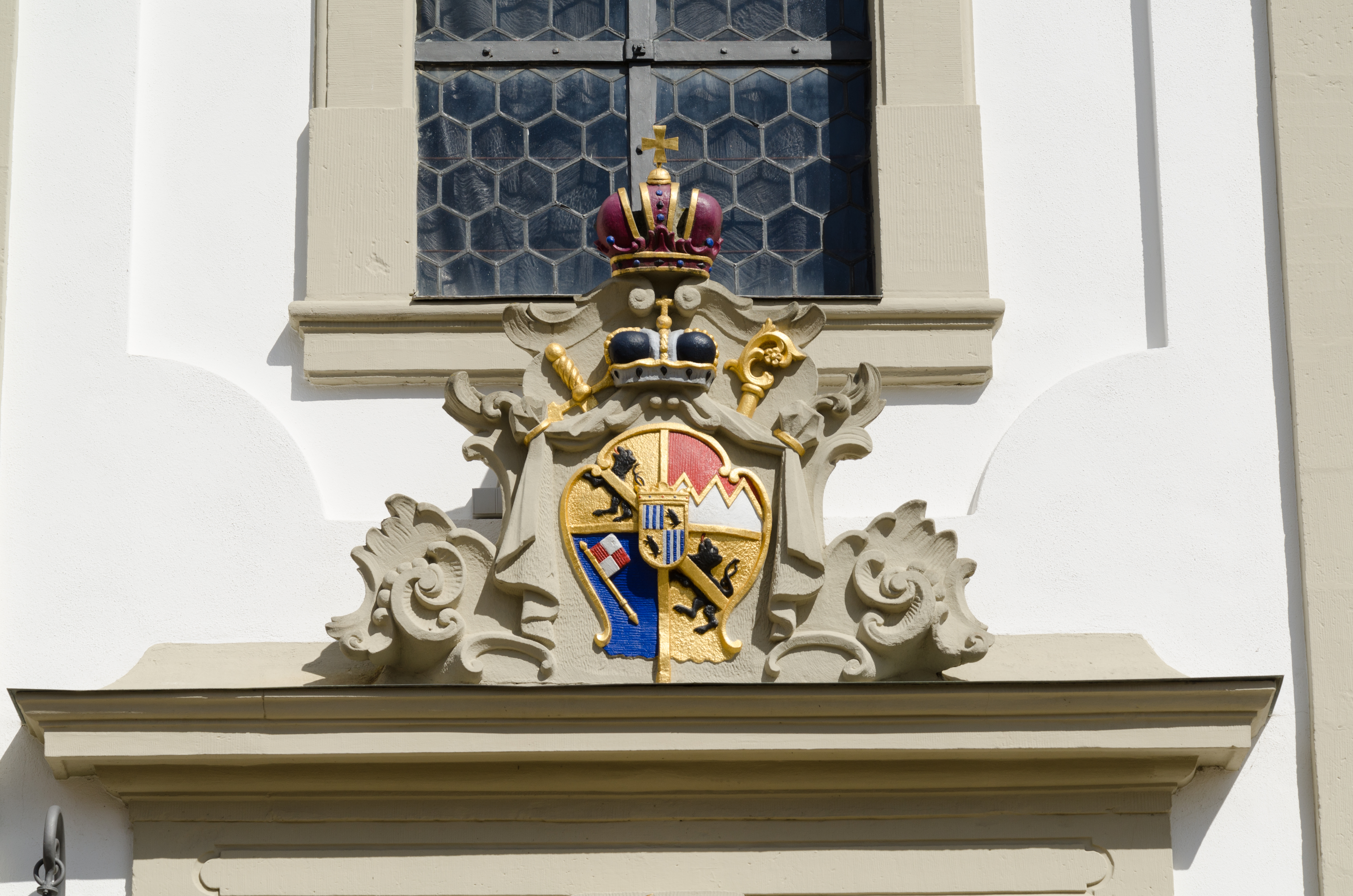 Fuchsstadt, Katholische Kirche